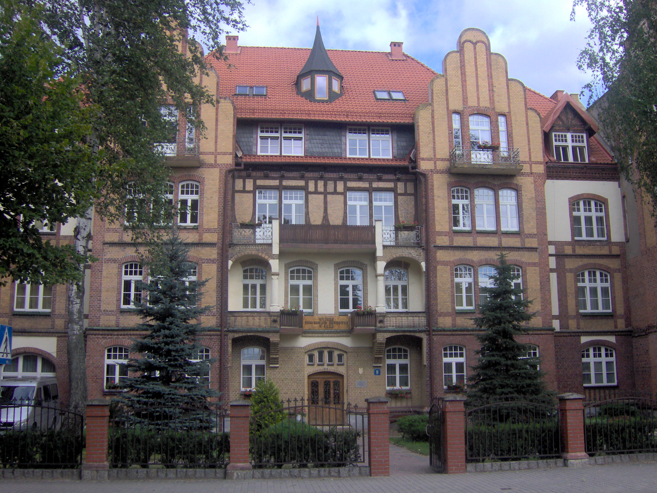 Ełk, ul. Kościuszki 9 - budynek Wyższego Seminarium Duchownego (zabytek nr A-3703)